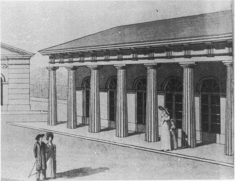 Dresden